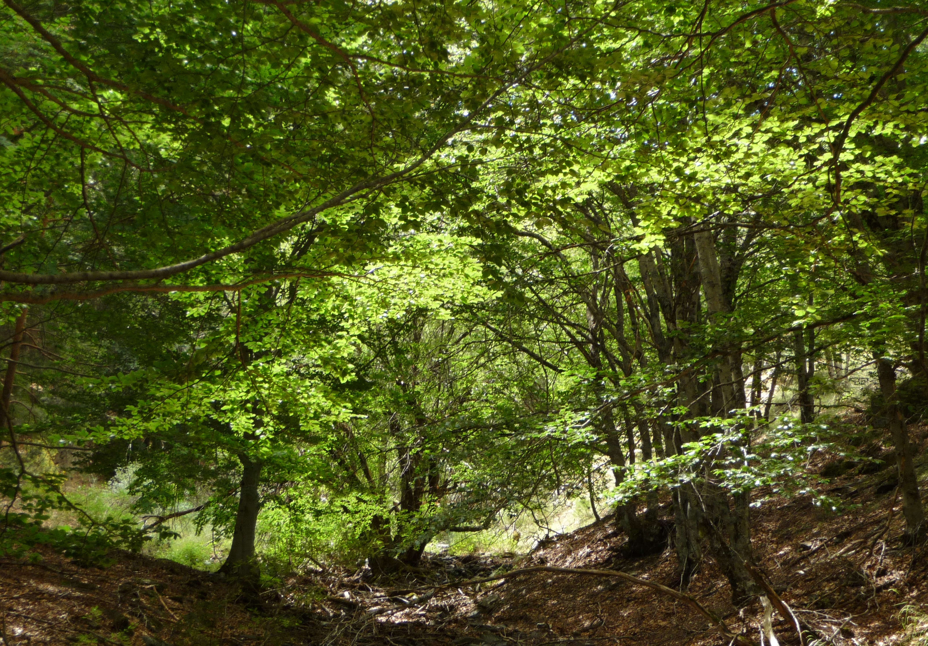 Sierra de Ayllón This is a photography of a Special Area of Conservation in Spain with the ID: ES0000164. Natura2000 entry, EEA entry